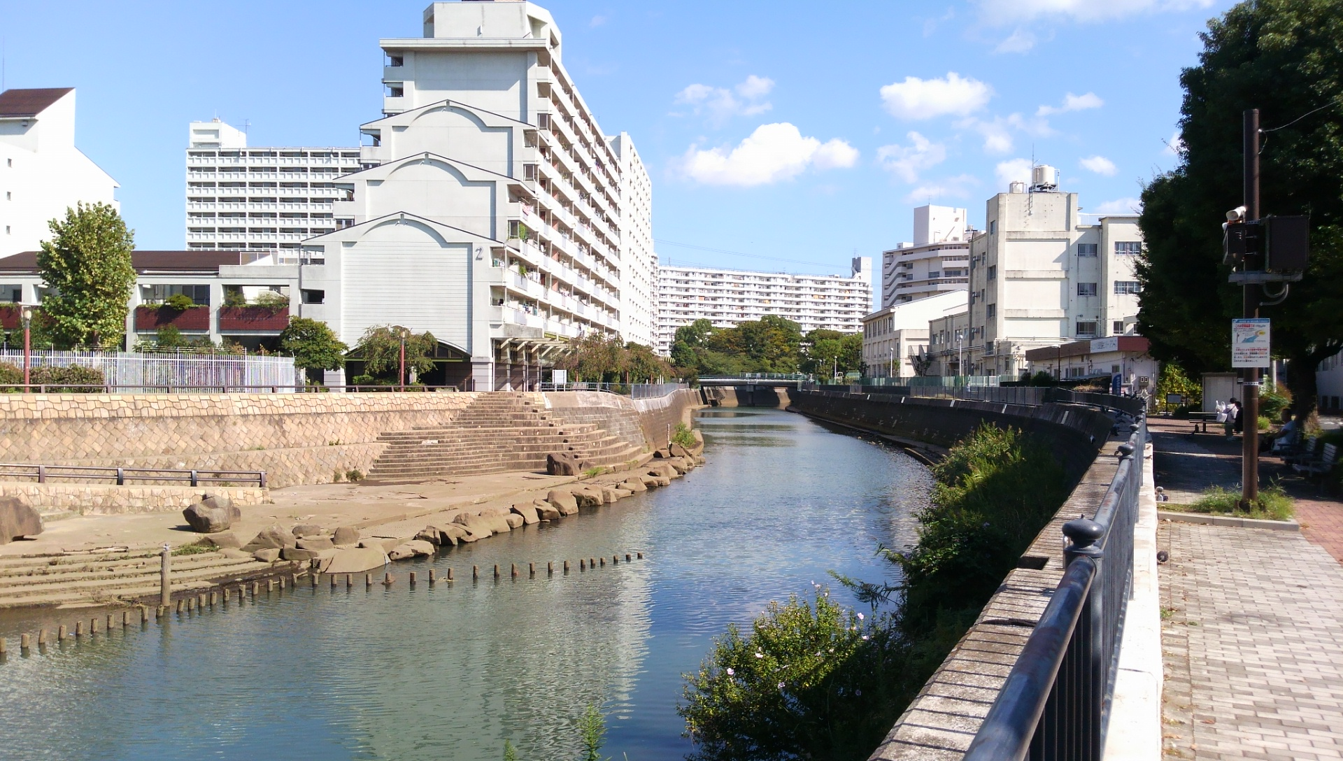 保土ヶ谷区を流れる帷子川。柳橋付近より下流（東南東）の方向を見る。地図はこちら。